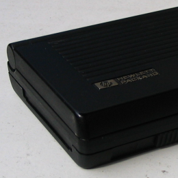 HP 95LX PCMCIA side